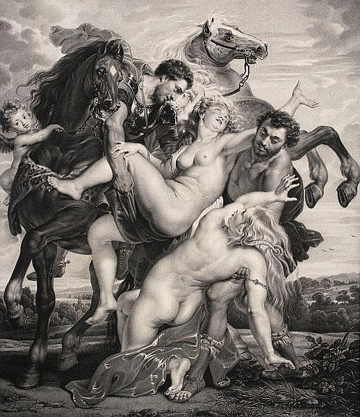 Entführung von Phoebe und Elaira